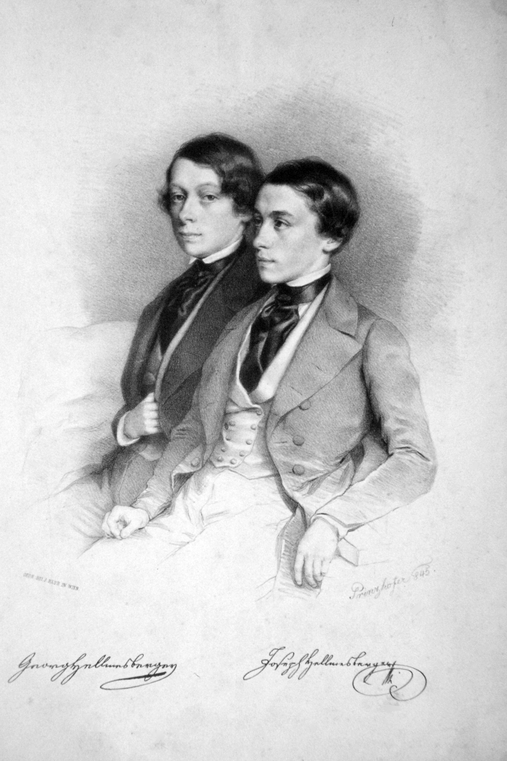 Die Brüder Georg d. J. (1830-1852) und Josef (1828-1893) Hellmesberger. Musiker, Komponisten und Geiger. Lithographie von August Prinzhofer, 1845